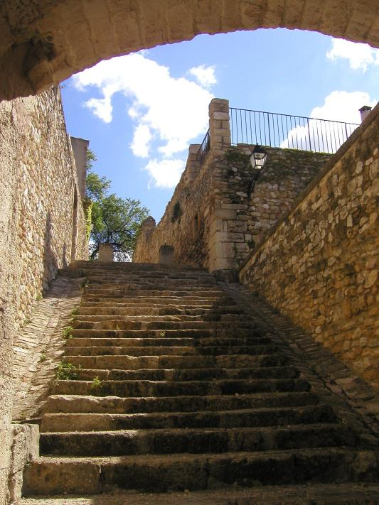 Commune de Robion, Vaucluse, Calade dans le vieux village